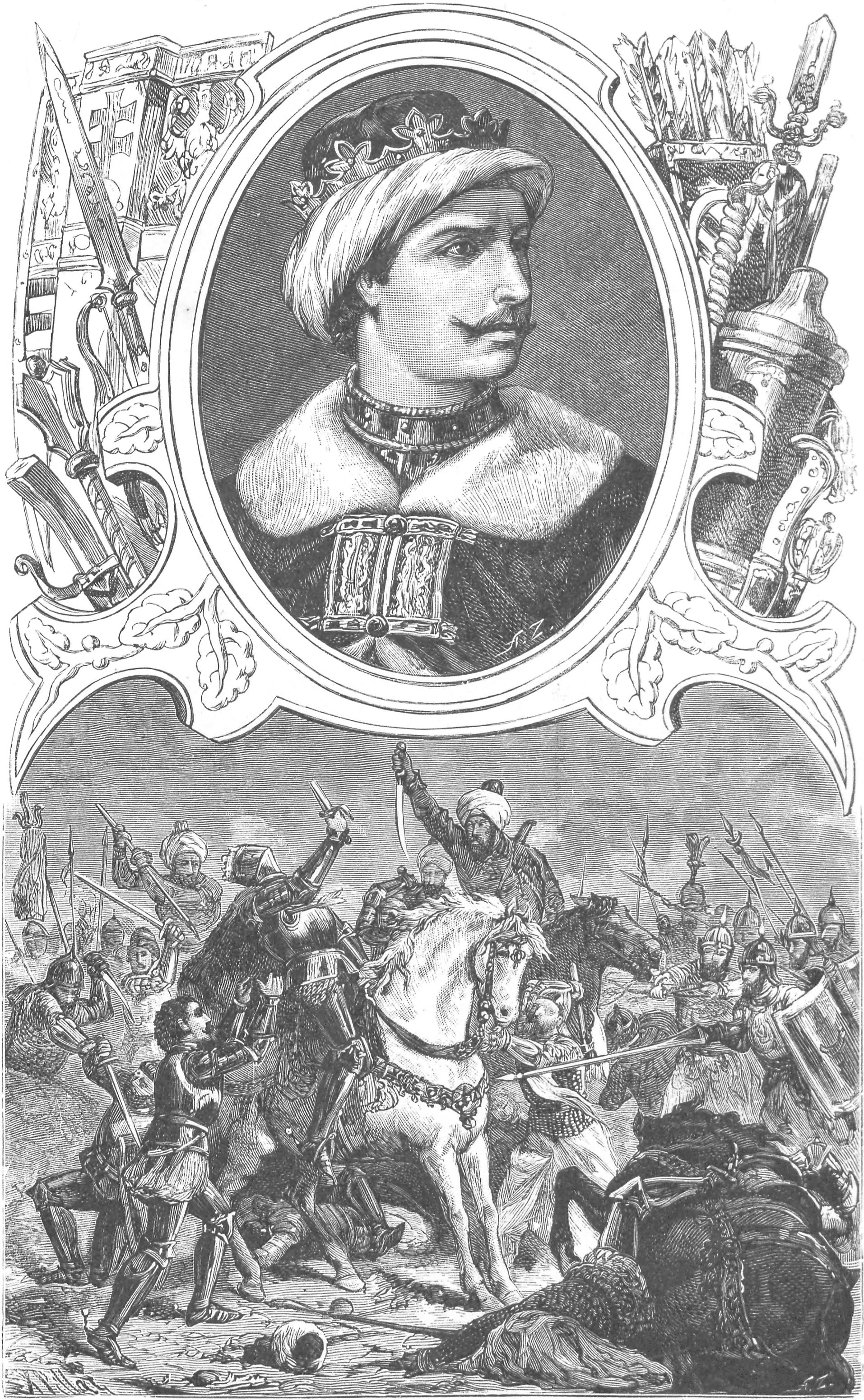 ilustracja z książki „Wizerunki książąt i królów polskich“